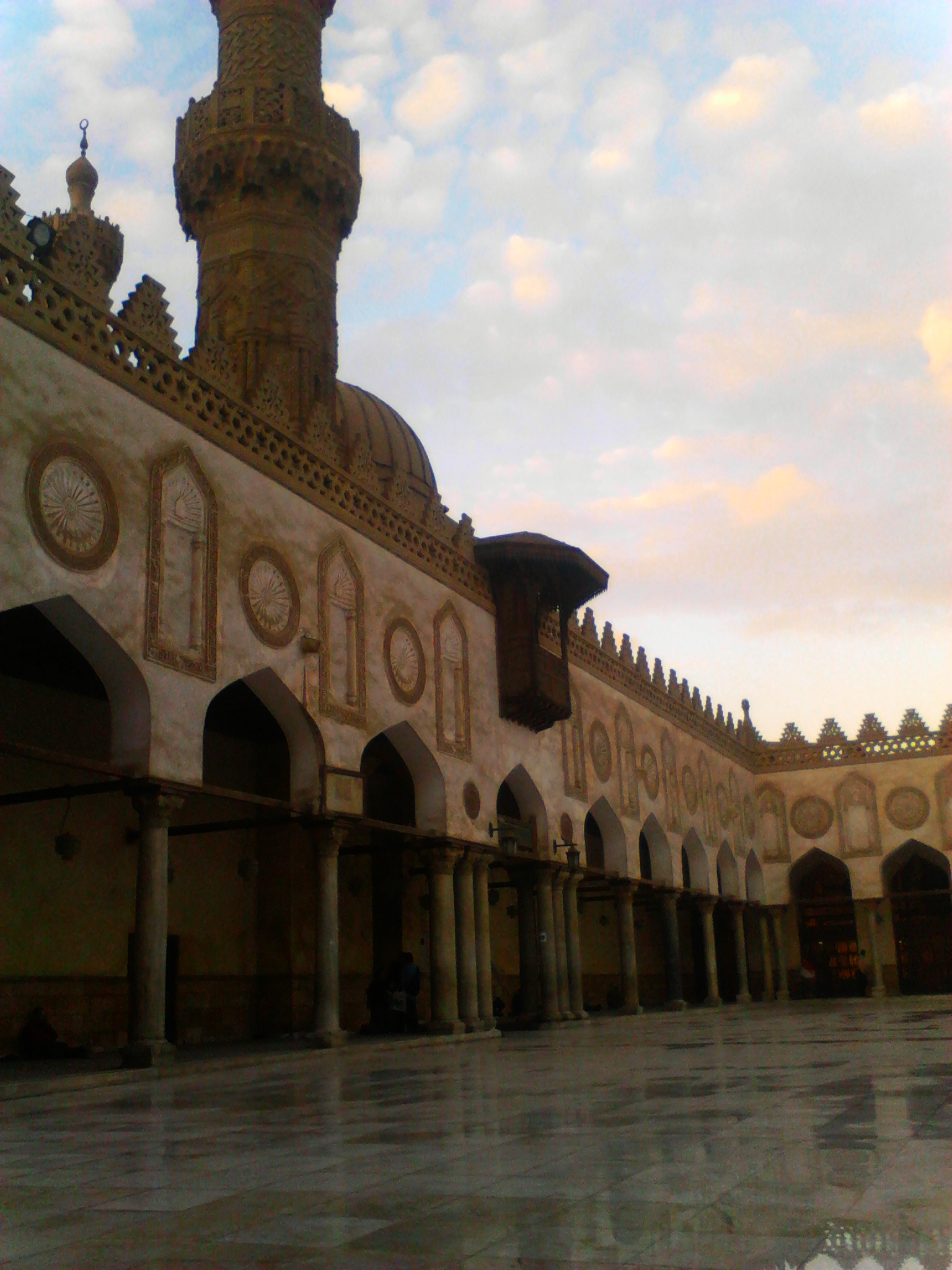 الازهر الشريف فى المطر